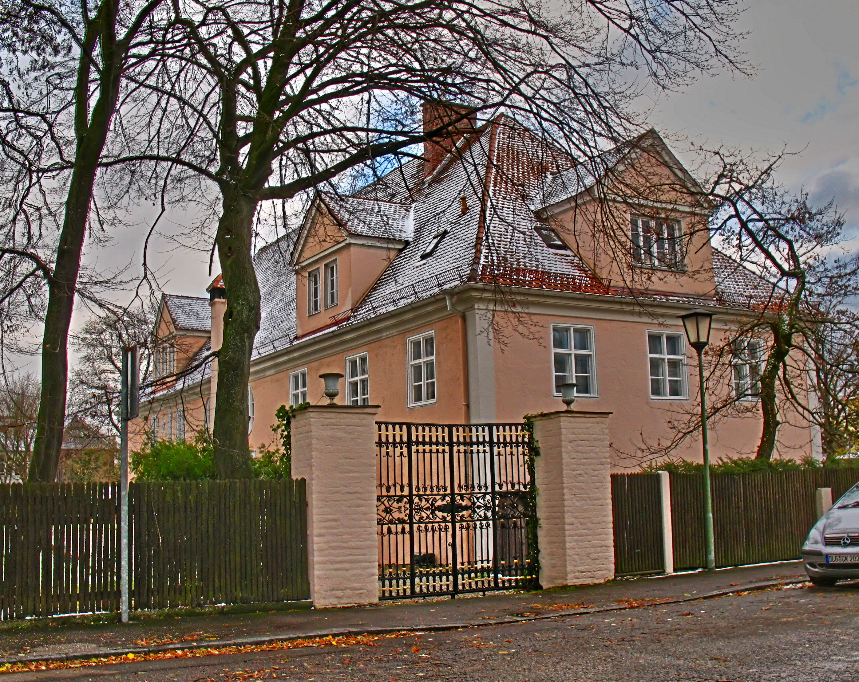 Germany, Bavaria, Munich, Laim, Laimer Schlössl